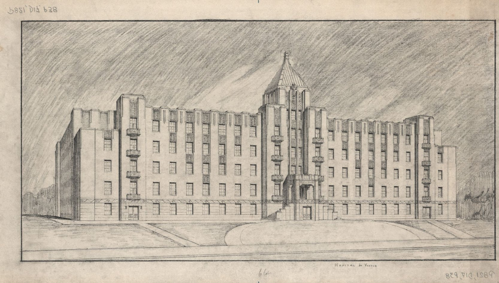 Hôpital général du Christ-Roi-de-Verdun / Alphonse Venne . - Échelles multiples . - 1929-1930